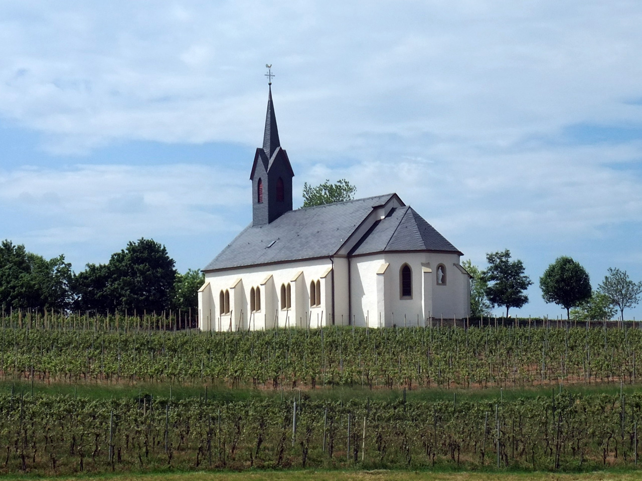 Rochuskapelle in Nittel, Obermosel